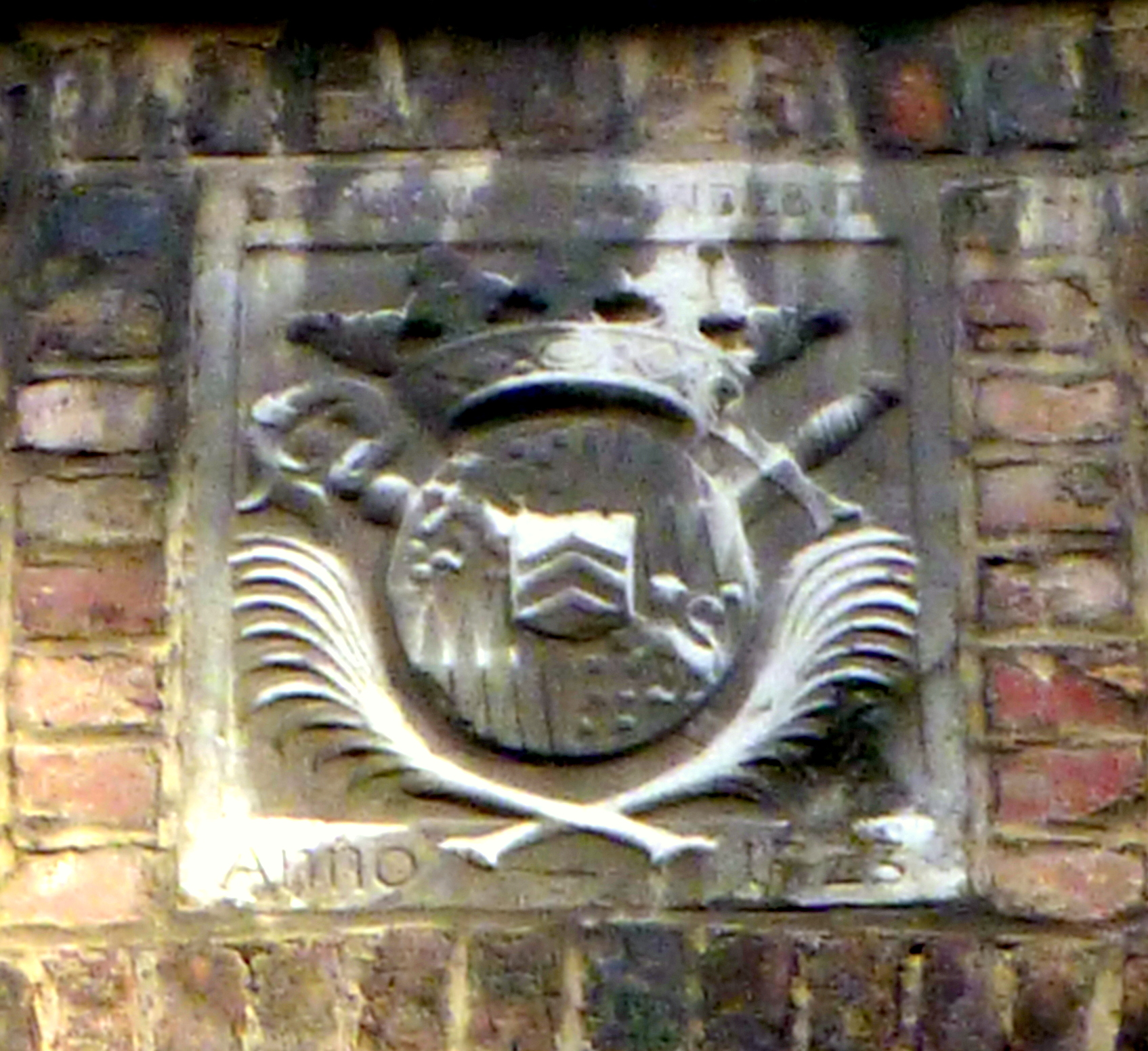 Wappenstein der Äbtissin Anna Carolina Margarethe van Renesse van Elderen in Aachen-Burtscheid